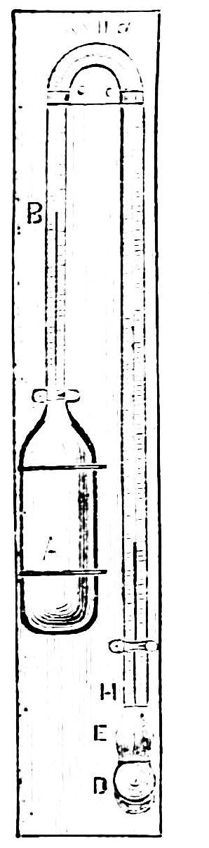 Piezometer to measure sea depth